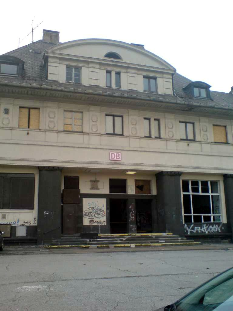 Das Empfangsgebäude des Bahnhofs Friedrichsthal